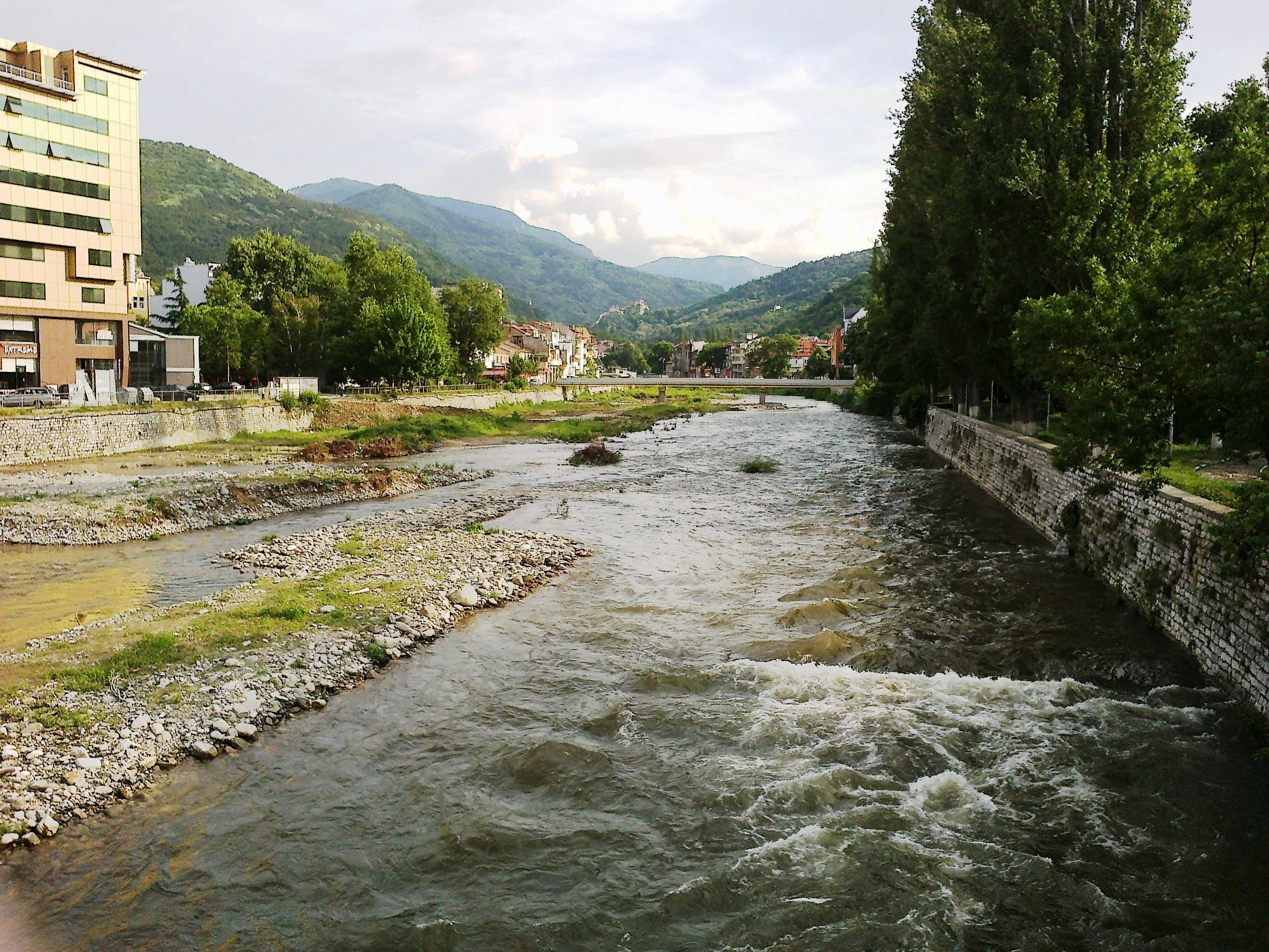 Изглед към Чепеларската река (Чая). Асеновград, България.